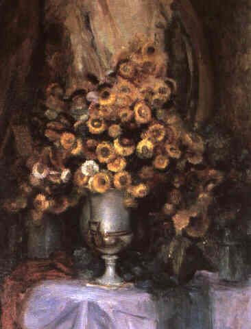 Stillleben